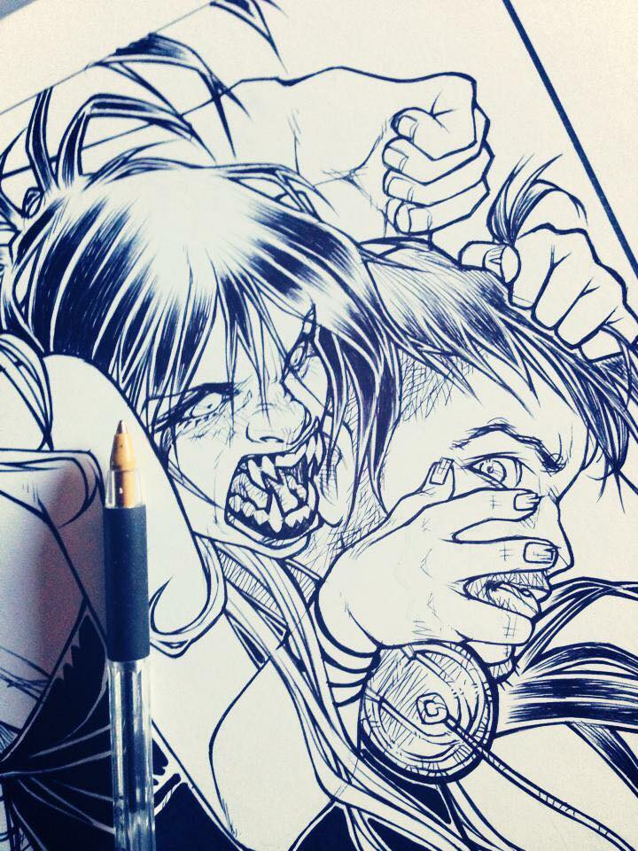 Immagine interna di una delle tavole degli albi di Rigel